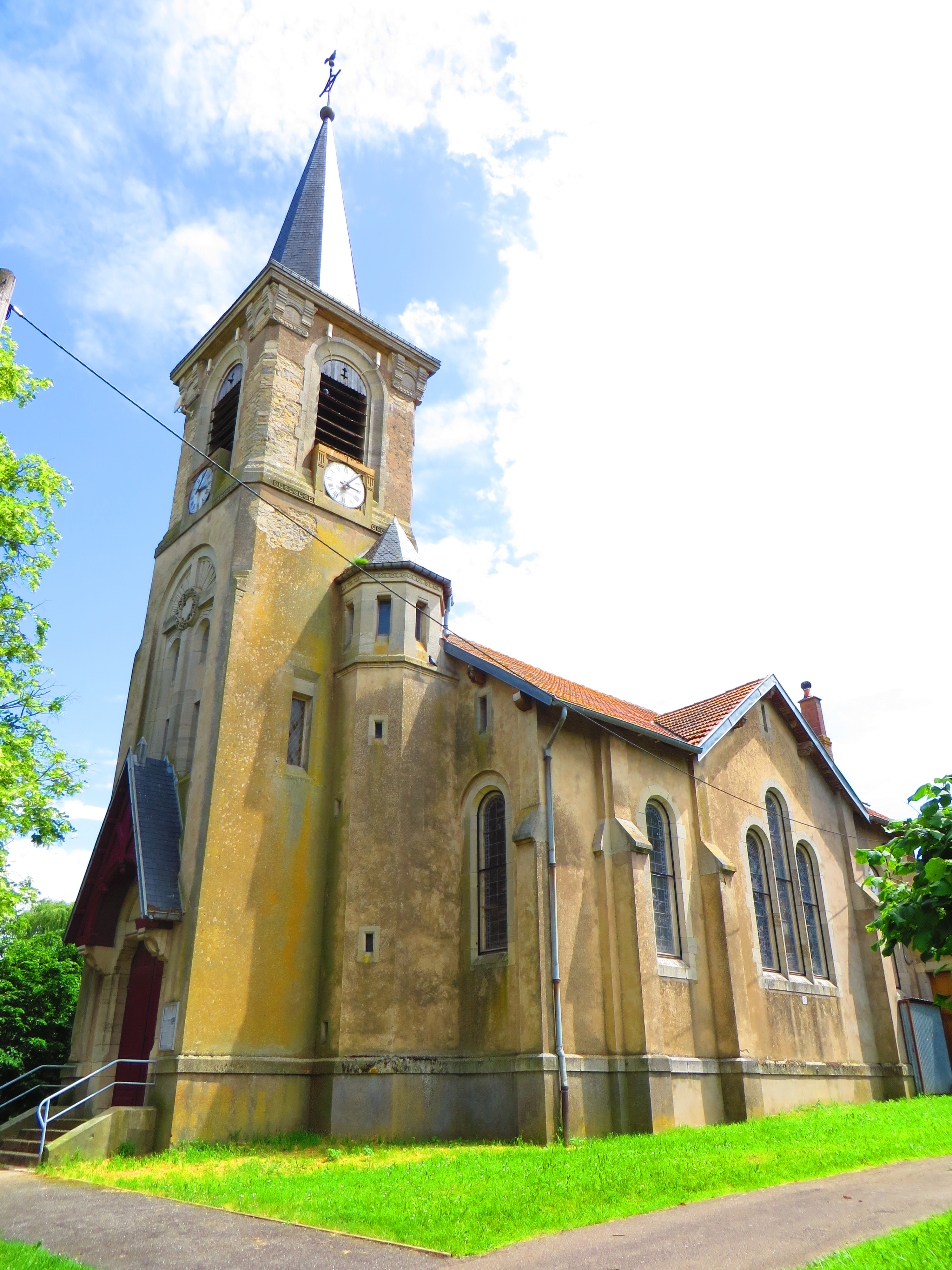 Chenicourt Église Saint-Jean-Baptiste